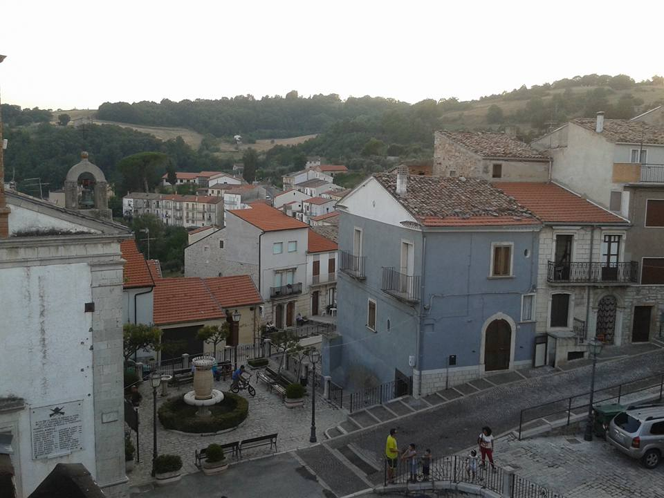 Veduta aerea di Piazza della Vittoria